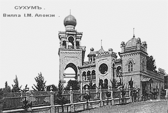 Aloisi villa in Sukhumi, Abkhazia.